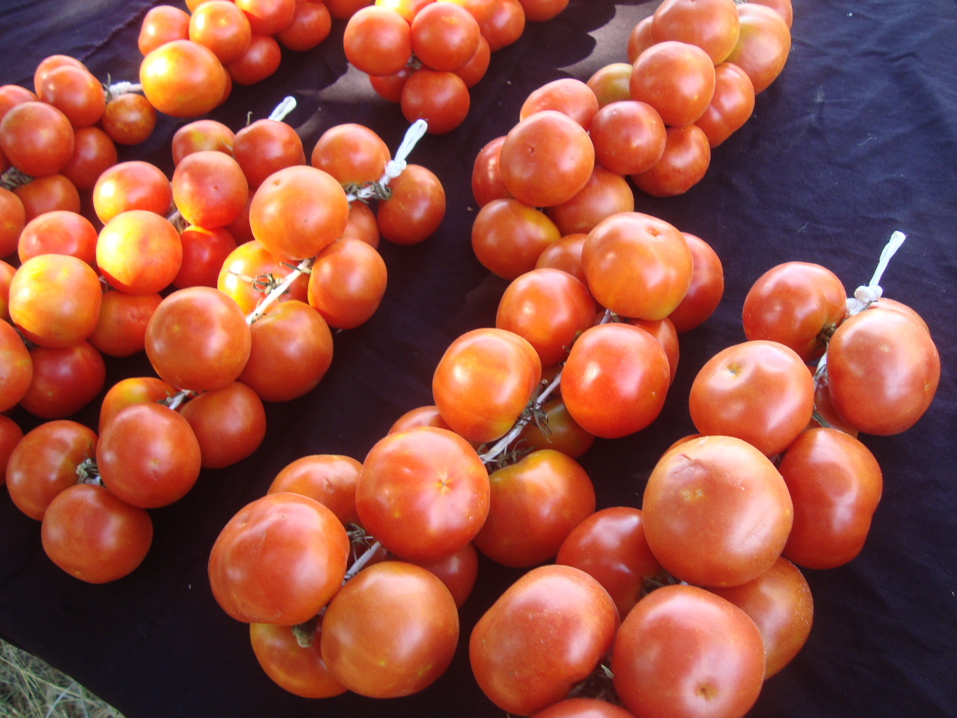 Tomates de colgar, producto icónico de la Huerta de Capicorb